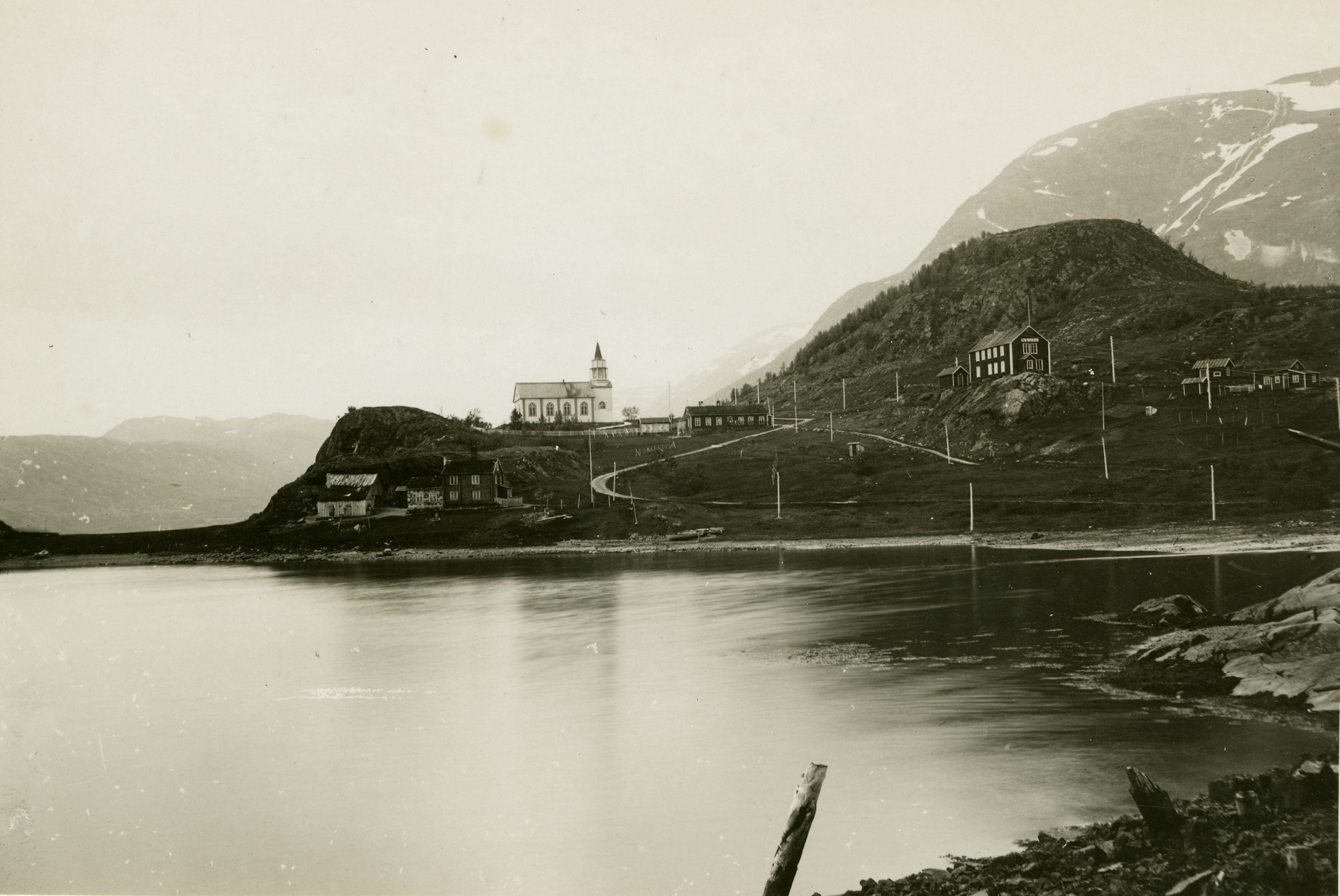 Kåfjord kirke, Finnmark This image on crowdsourcing geotagging platform Fotodugnad